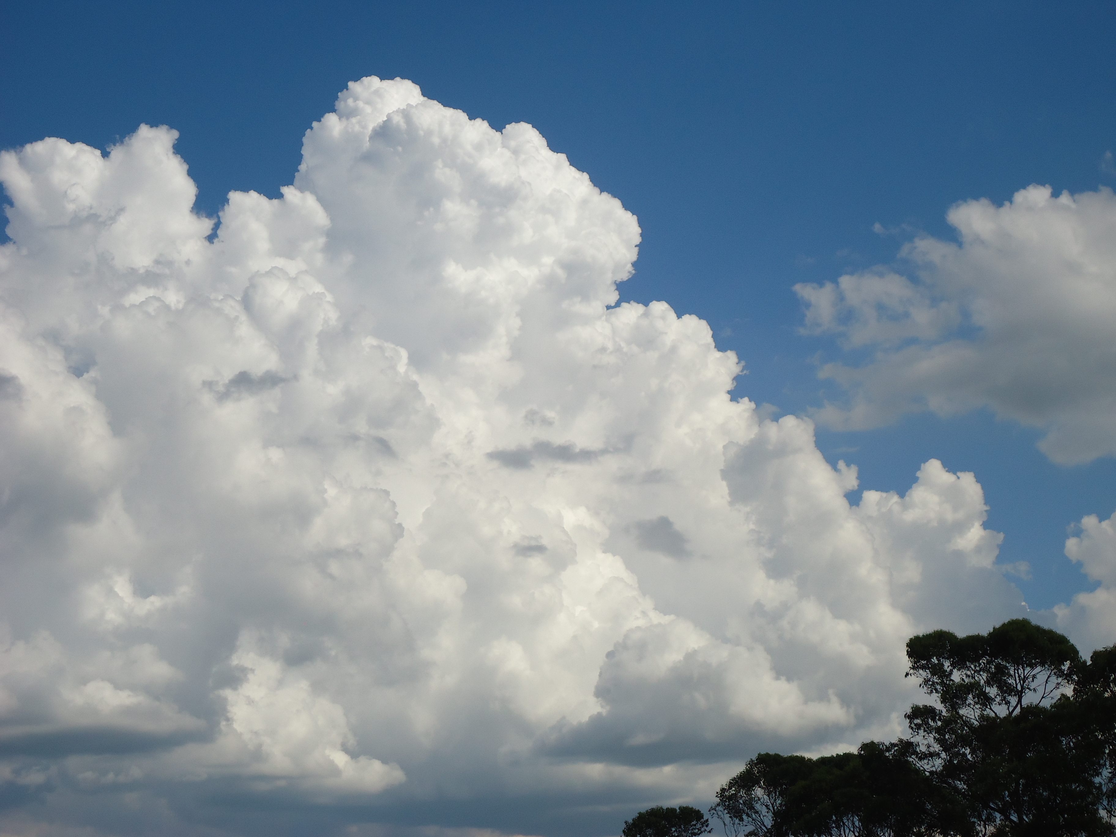 Vista de um exemplo de uma nuvem cumulus fotografada sobre Três Pontas, Minas Gerais.